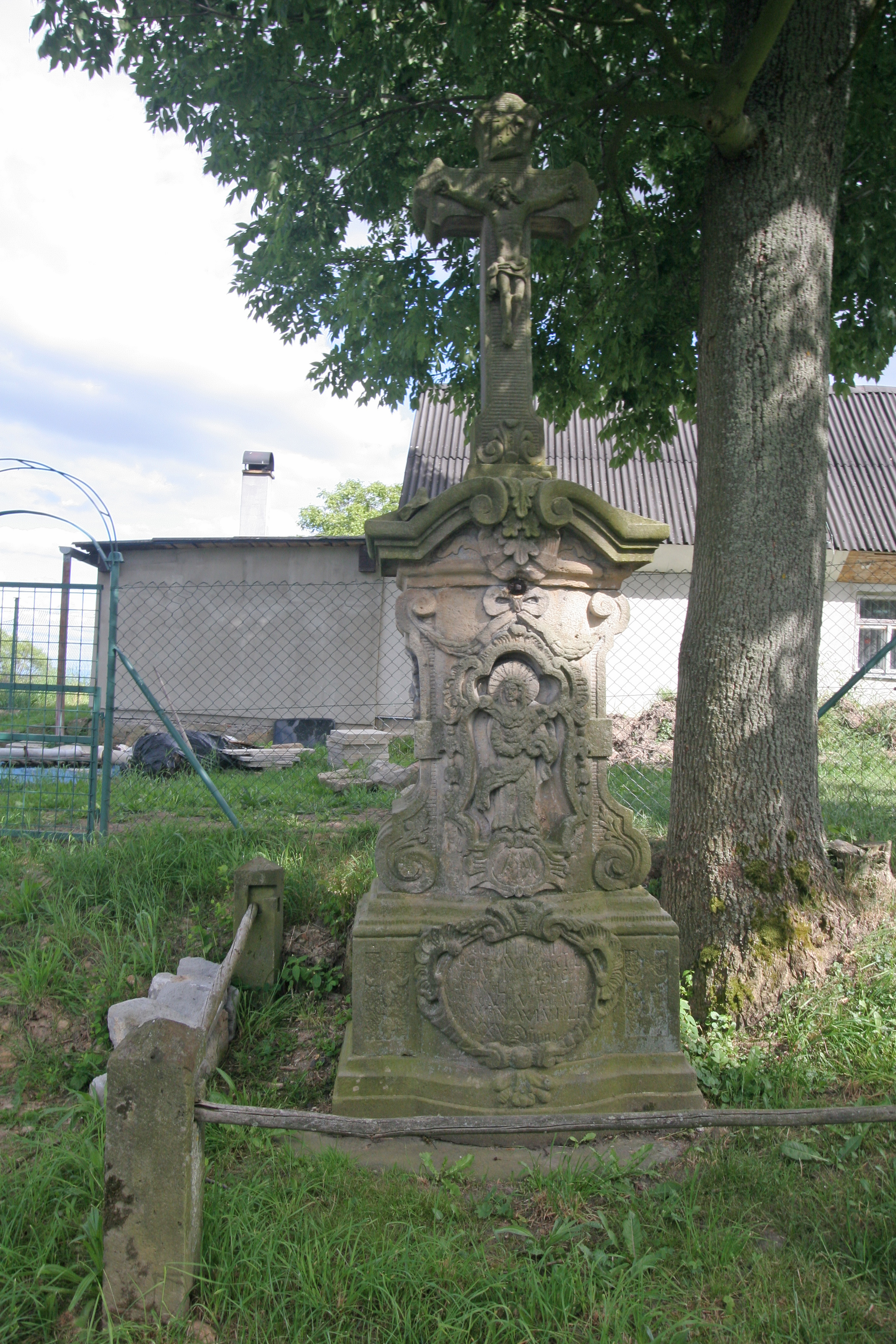 Krucifix, před čp. 11